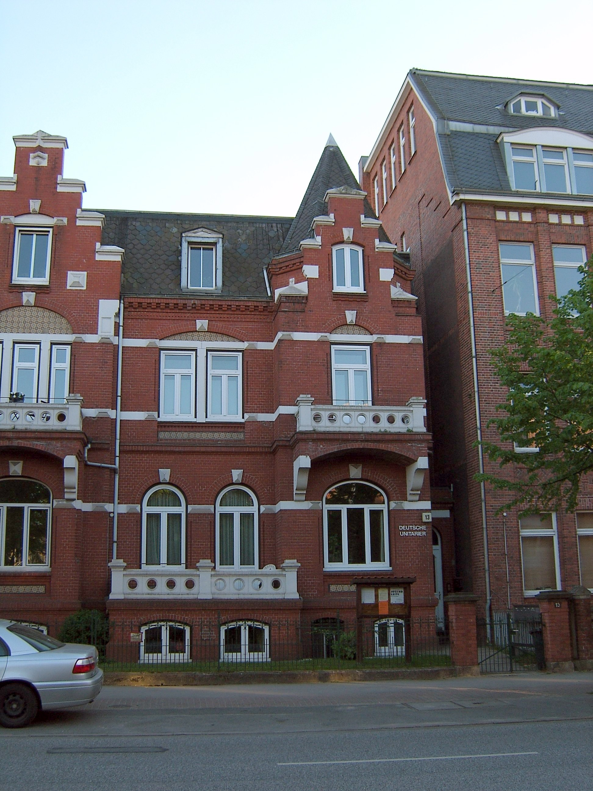 Gebäude der Deutschen Unitarier in der Wartenau in Hohenfelde